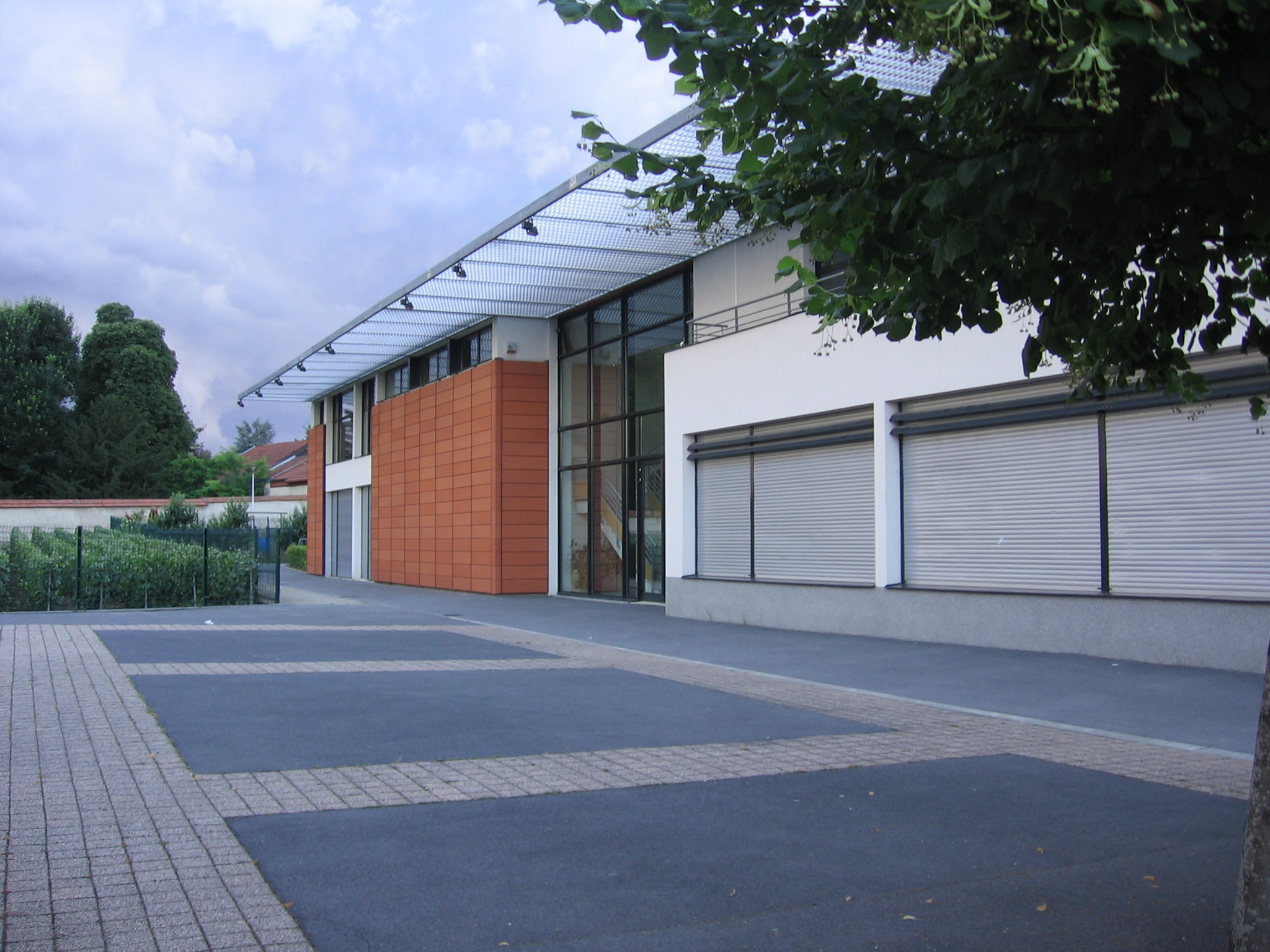 Médiathèque de Dizy